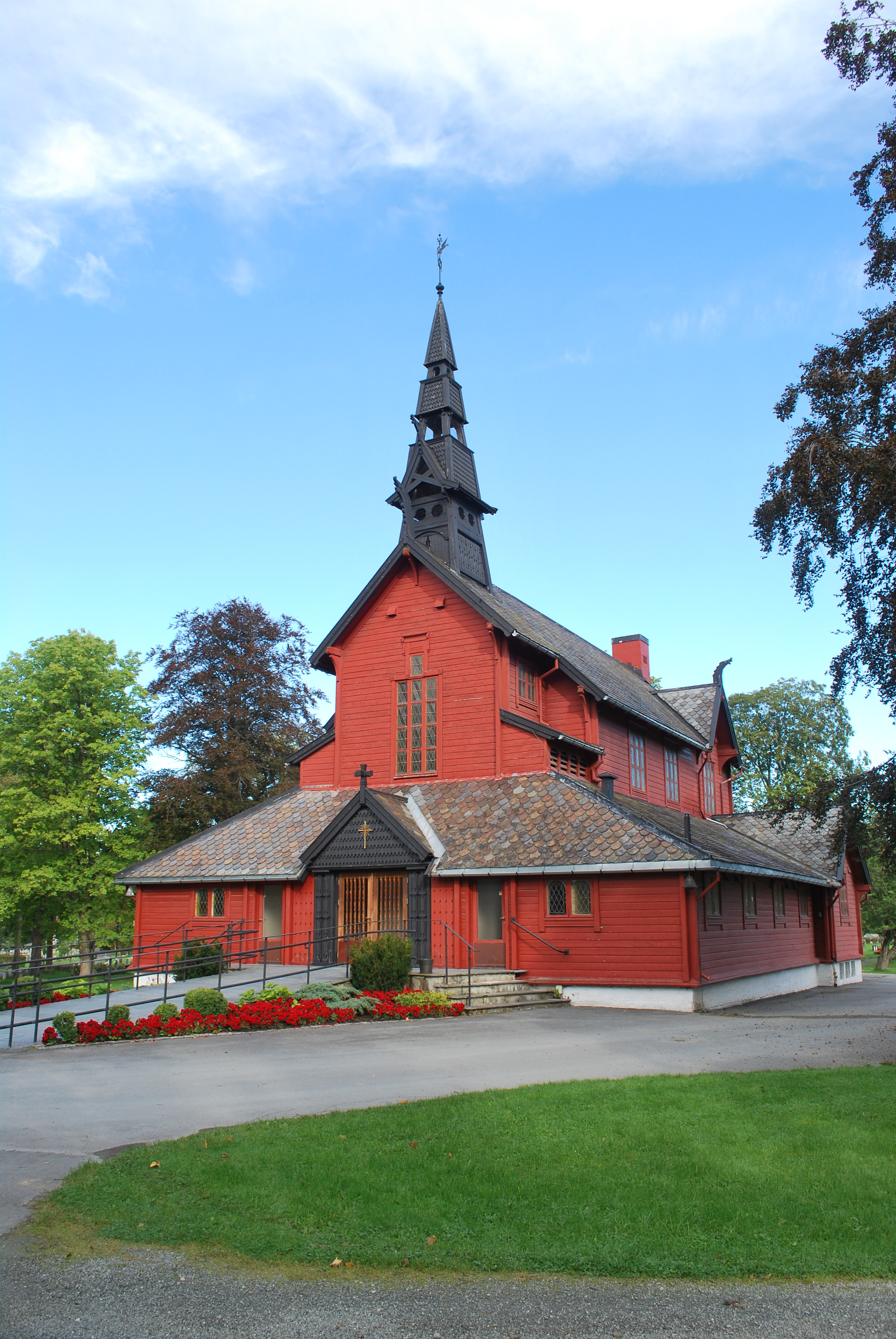 Tilfredshet kapell i Trondheim. Arkitekt Nils Ryfjord.